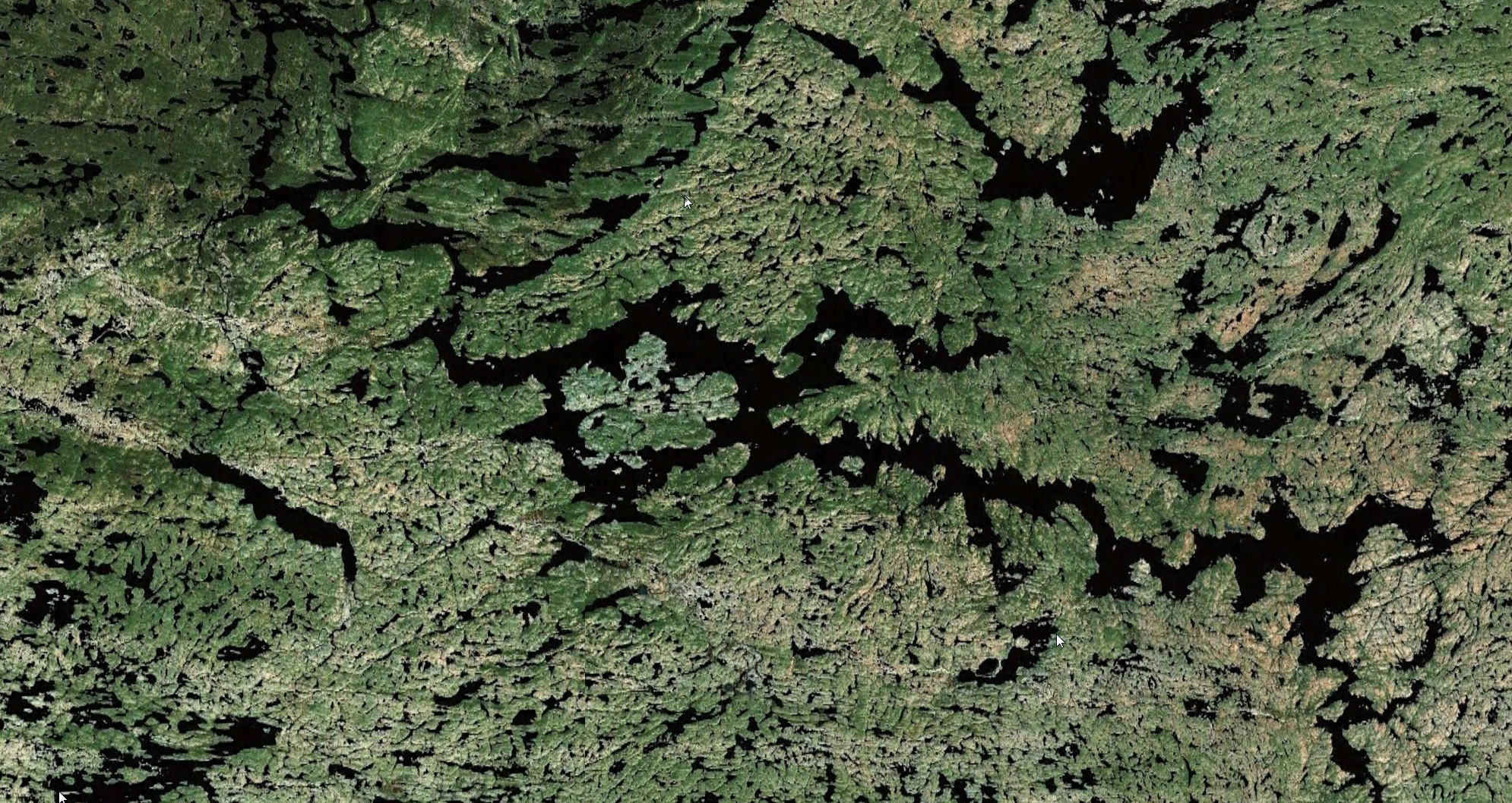 Lac Point (Territoires du Nord-Ouest)